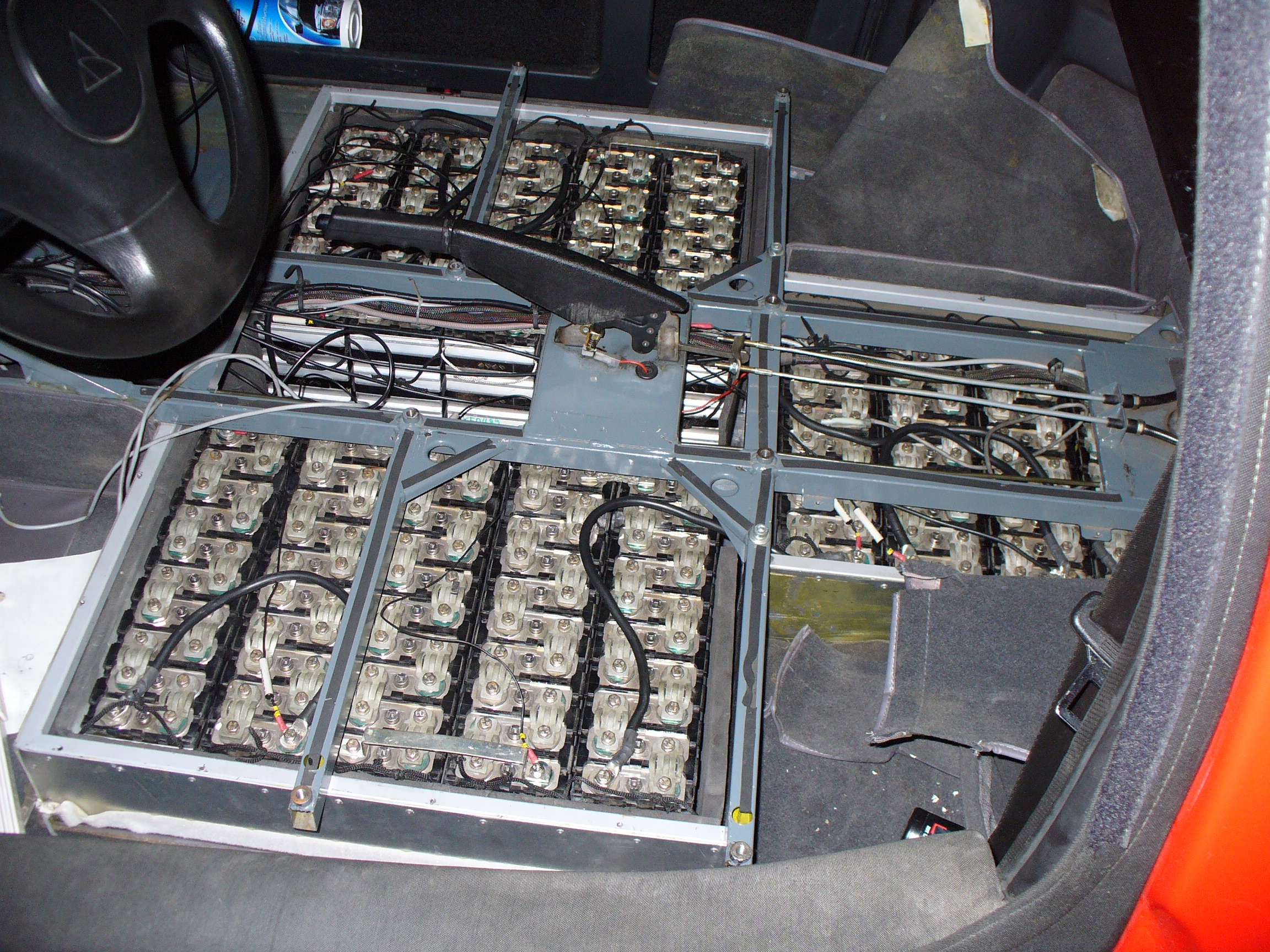 Traktionsbatterie aus 14x 12V-78Ah-NiMH-Blöcken der Firma GP (Typ: 10/GP80EVS) im Elektroauto Hotzenblitz